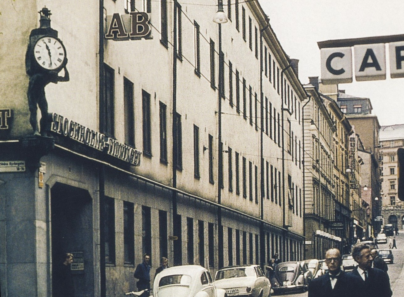 Stockholms-Tidningens byggnad och klocka, vy österut längs med Vattugatan. Ombyggd i början av 1950-talet efter ritningar av Ivar Tengbom